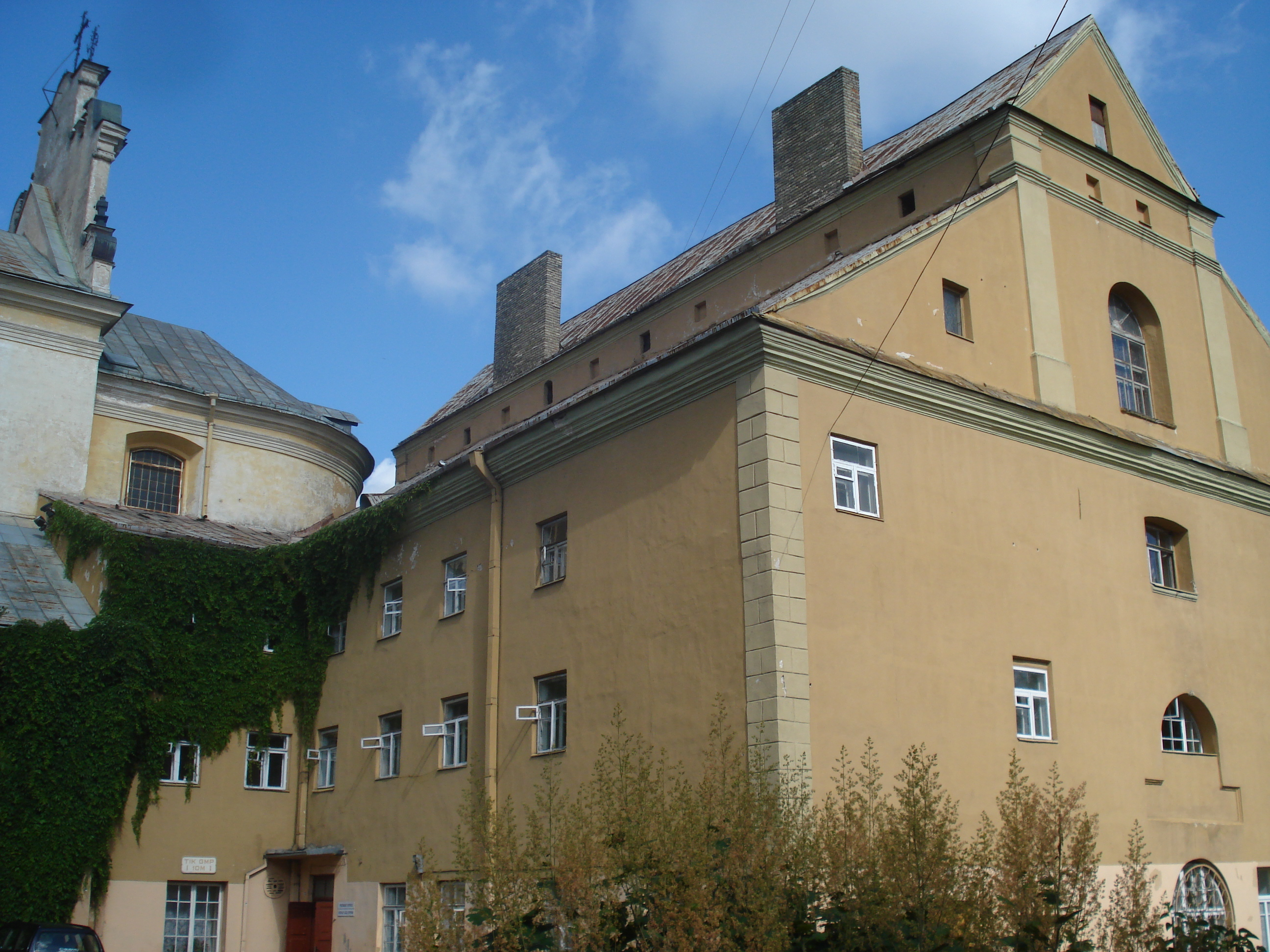 Cloister of the Missionaries in Vilnius = Misionierių vienuolynas = Klasztor Misjonarzy w Wilnie (Subačiaus g.)